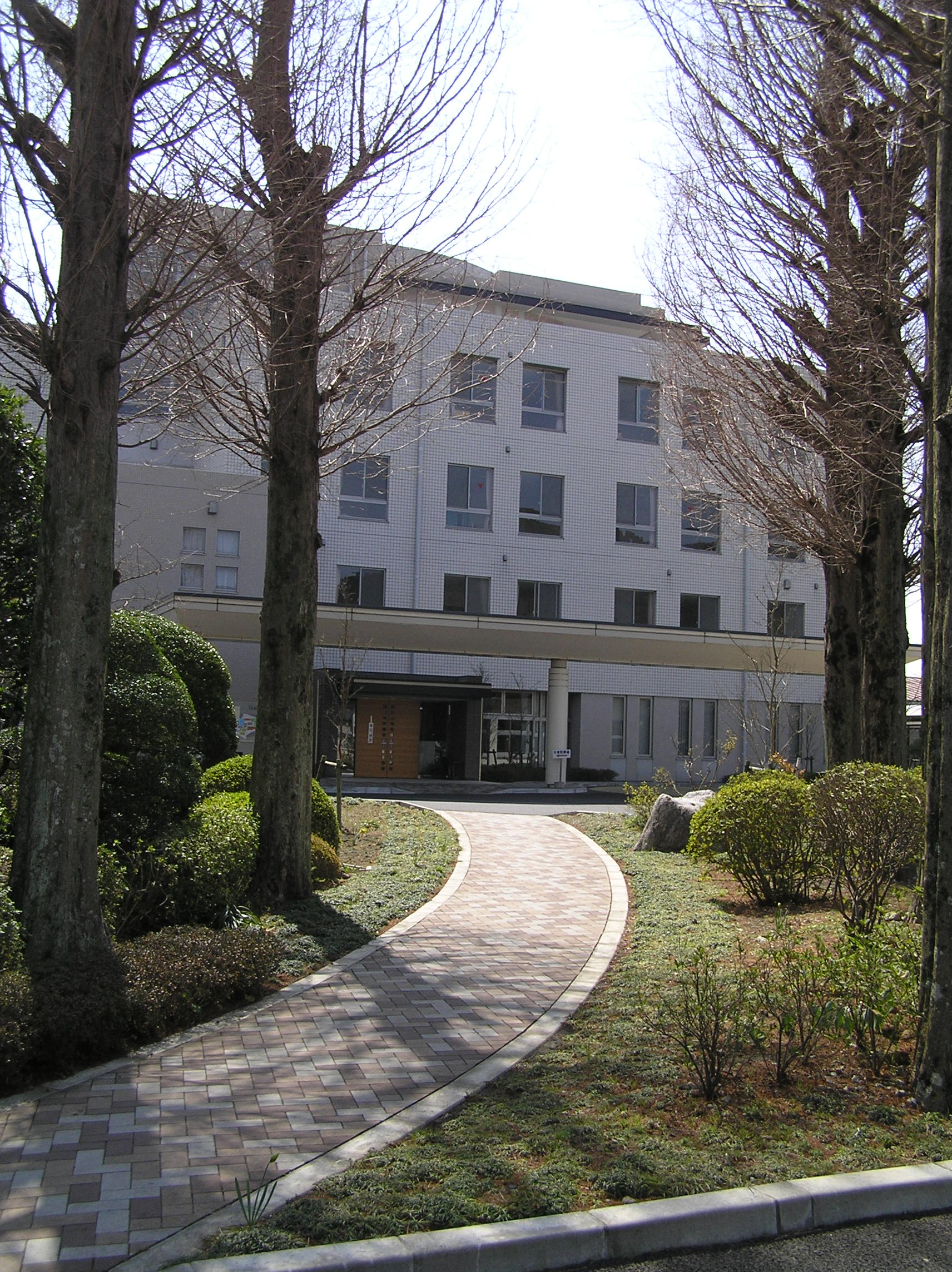 西部田入口 大多喜病院 ～photo by Autumn Snake 【おぉたむすねィく探検隊】